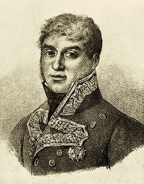 Grabado que representa al teniente general Luis Lacy y Gautier (1772-1817), que combatió en la Guerra de la Independencia Española y fue fusilado en 1817 por sublevarse contra el rey Fernando VII de España.